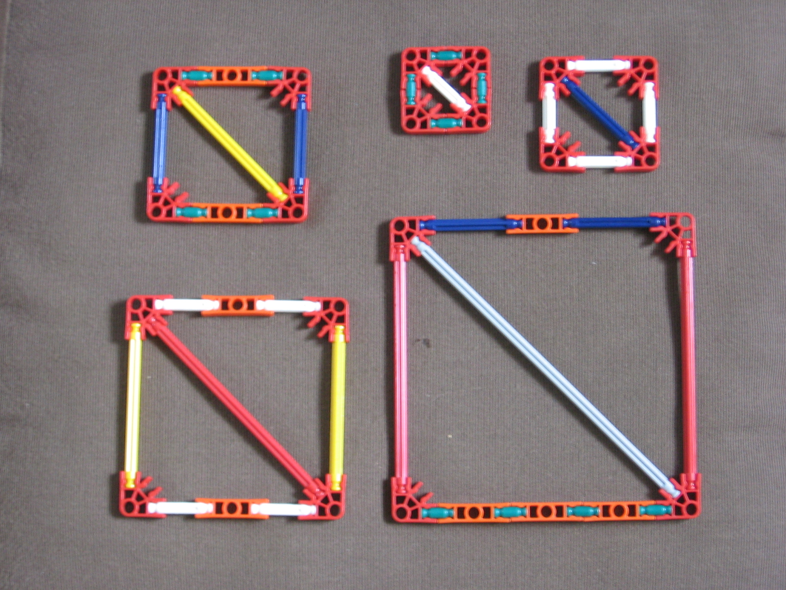 K'nex対角線＋２倍長法則